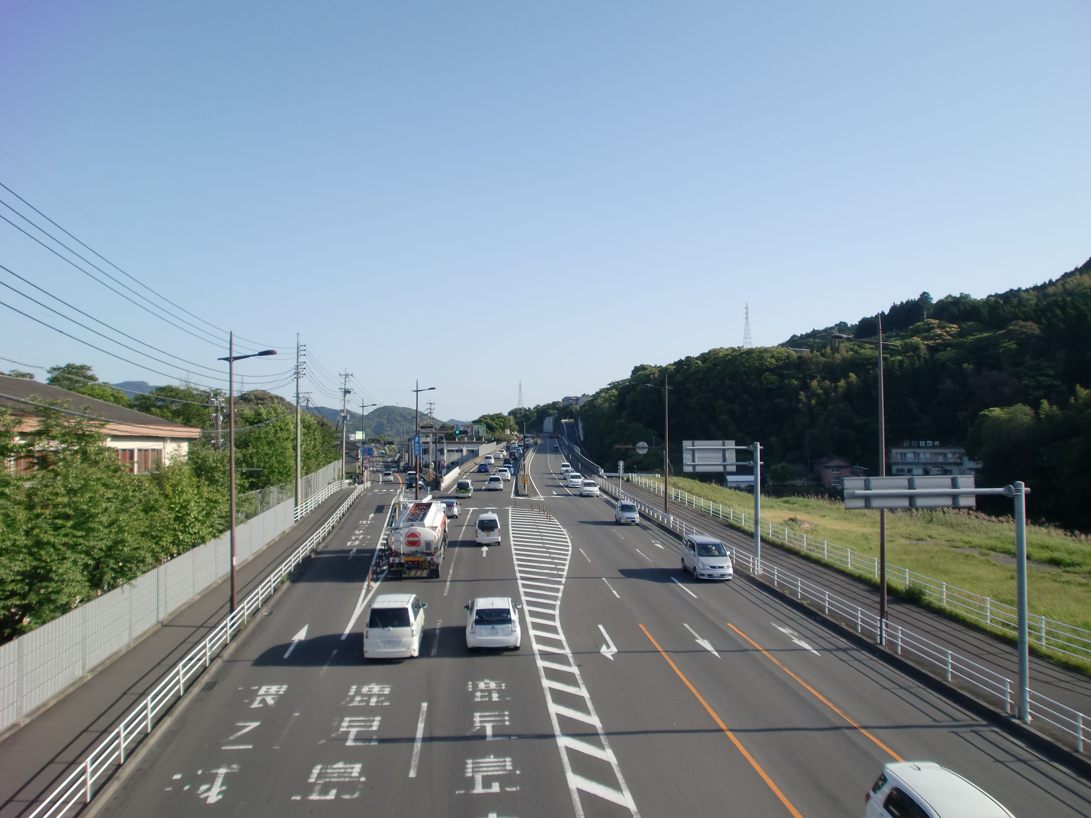 国道3号の隈之城バイパスの始点である向田町の歩道橋から鹿児島方面を撮影。